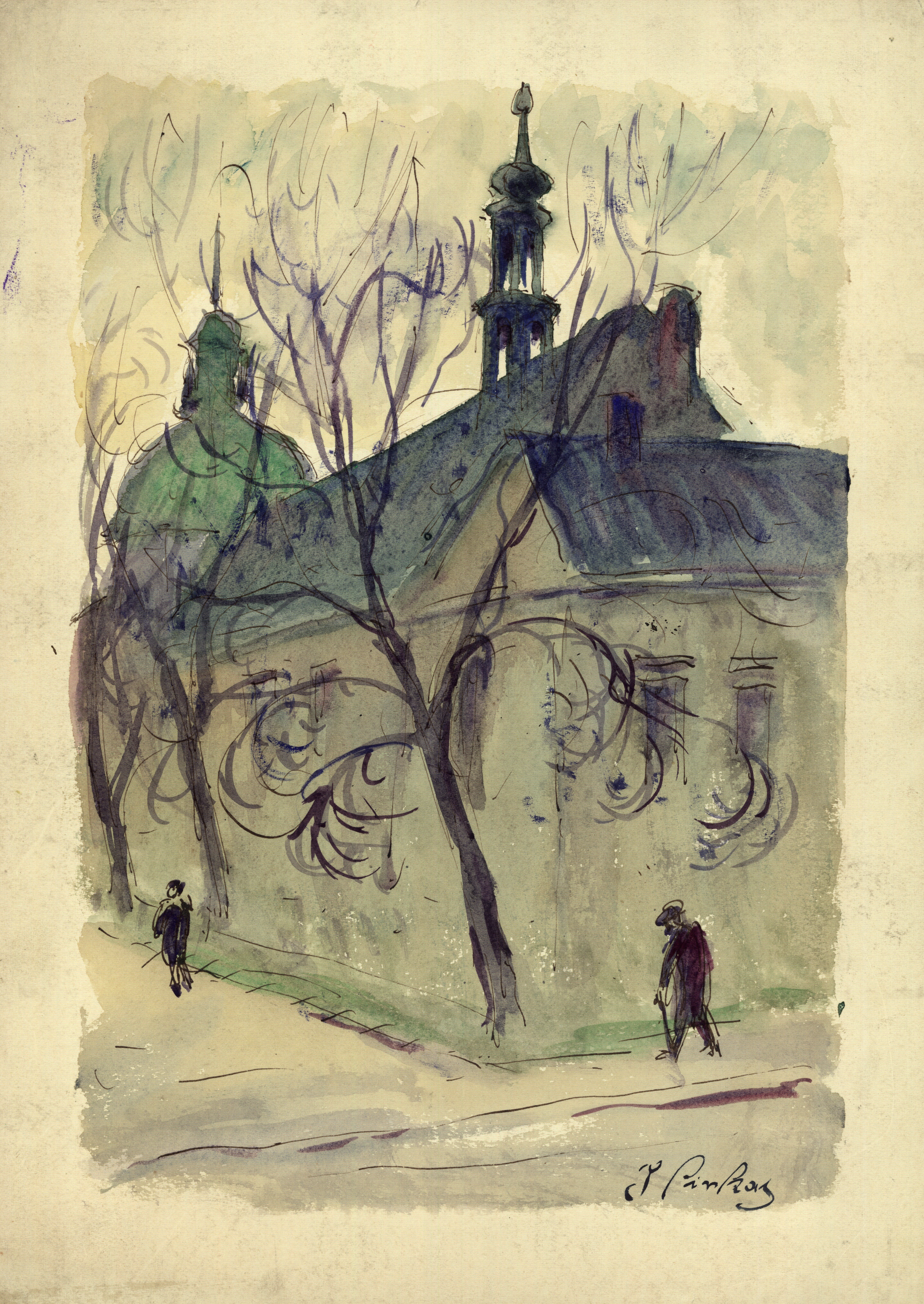 Rysunek Ignacego Pinkasa